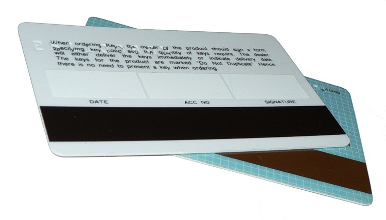 keycards